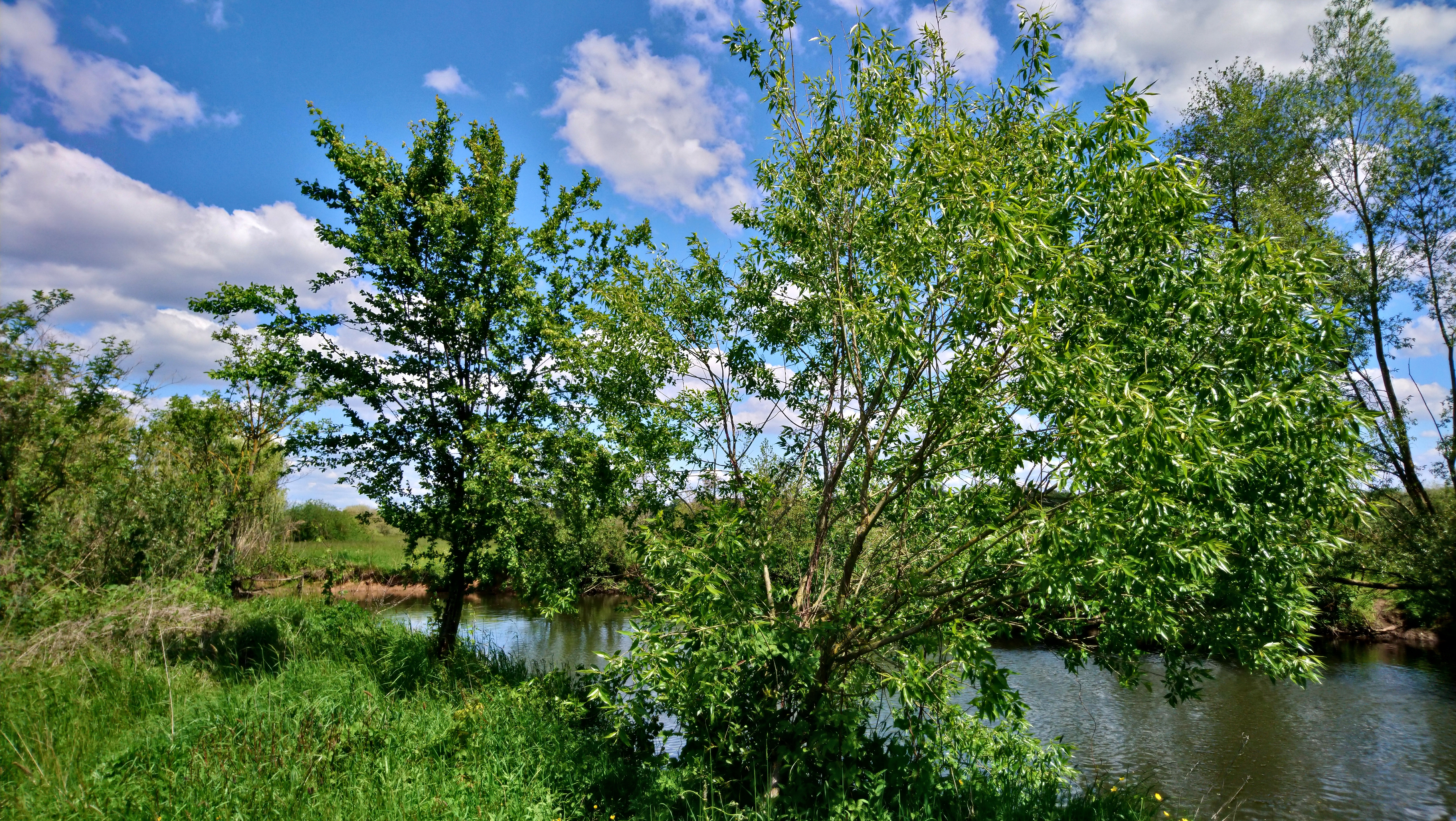 (NSG:HE-1435058)_Weideswiesen-Oberwald bei Erlensee